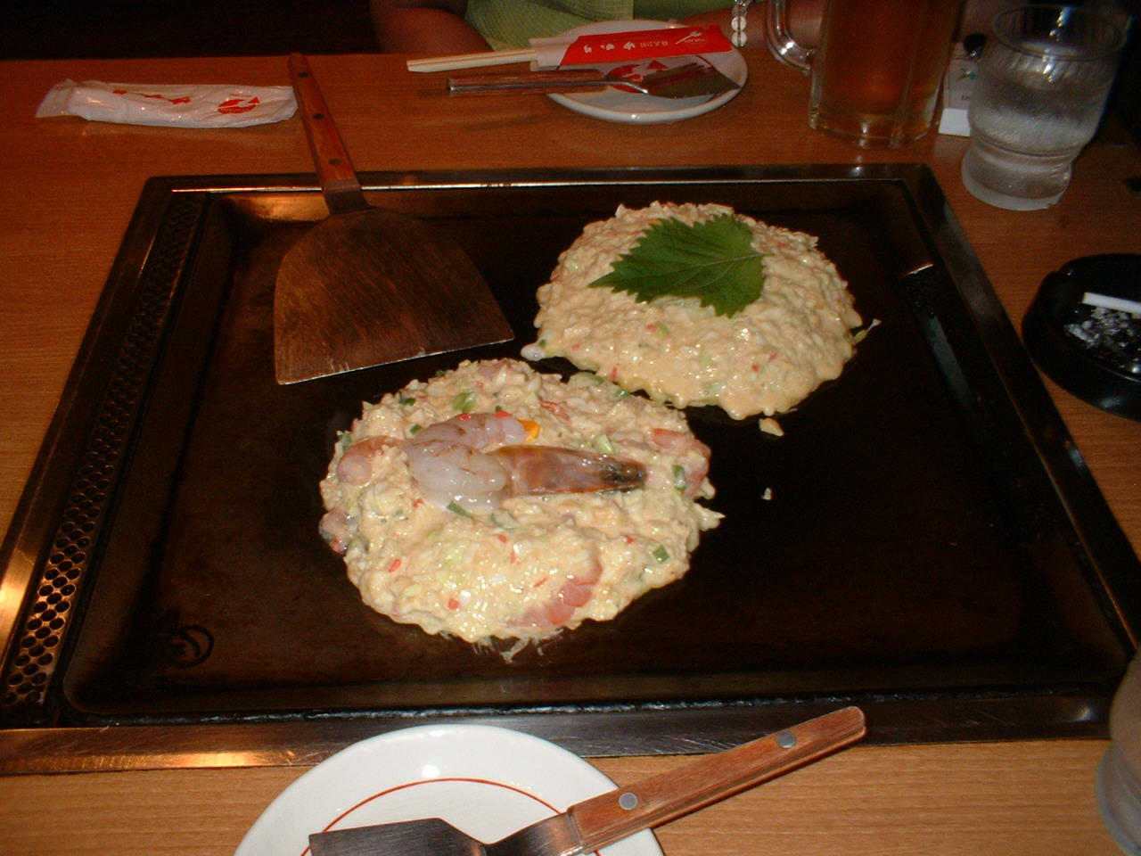 Half-made shrimp and cheese Okonomiyaki (えびとチーズのお好み焼き)